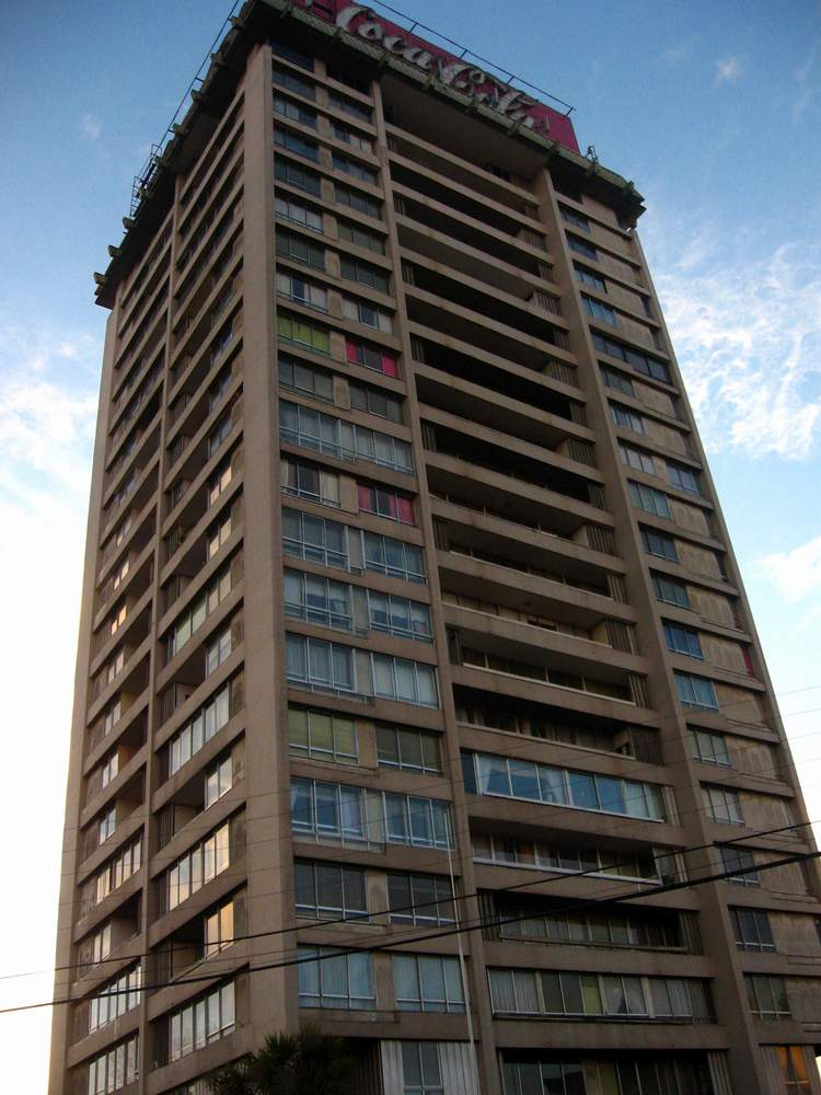 Edificio Torre Caupolicán de la ciudad de Temuco, Chile.